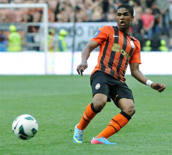 Дуглас Коста - бразильський футболіст під час виступів за ФК Шахтар